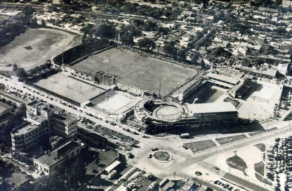 Estadio de Unión de Santa Fe en 1966